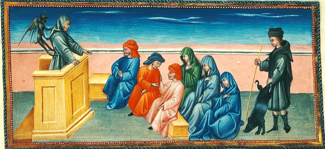 Divine Comedy. Dante. Giovanni di Paolo